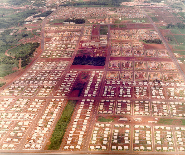 Vista area do bairro Vila A de Itaipu